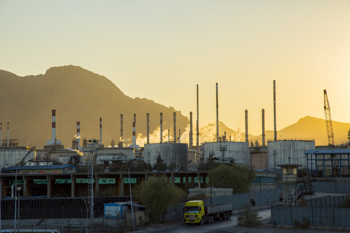 پالايشگاه اصفهان، پالايشگاه نفت جي